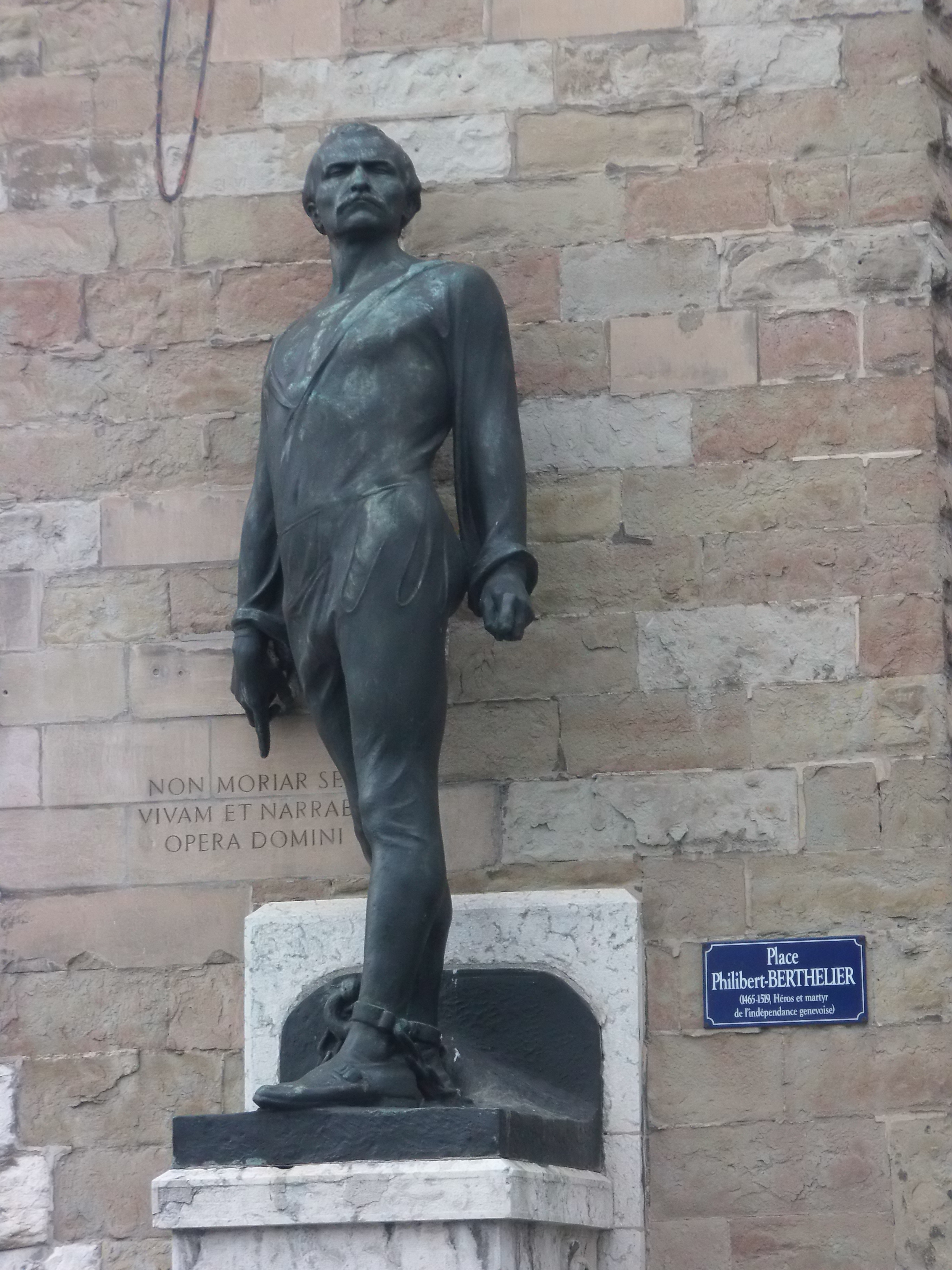 According to article 27 of the Copyright Act (en/de/fr/it), works installed at or on publicly accessible places or ground may be pictured, and such pictures may be offered for sale, sold, transmitted, or otherwise published. The image must not be three-dimensional and it must not be possible to use the picture for the same purpose as the original. The works must be permanently installed, but for the purposes of the law, "permanent" means a fixed installation which may be temporary -- time limited -- but not "accidental", e.g. due to transport of the work. Freedom of panorama Philibert Berthelier -- Tour de l'Île (Genève)